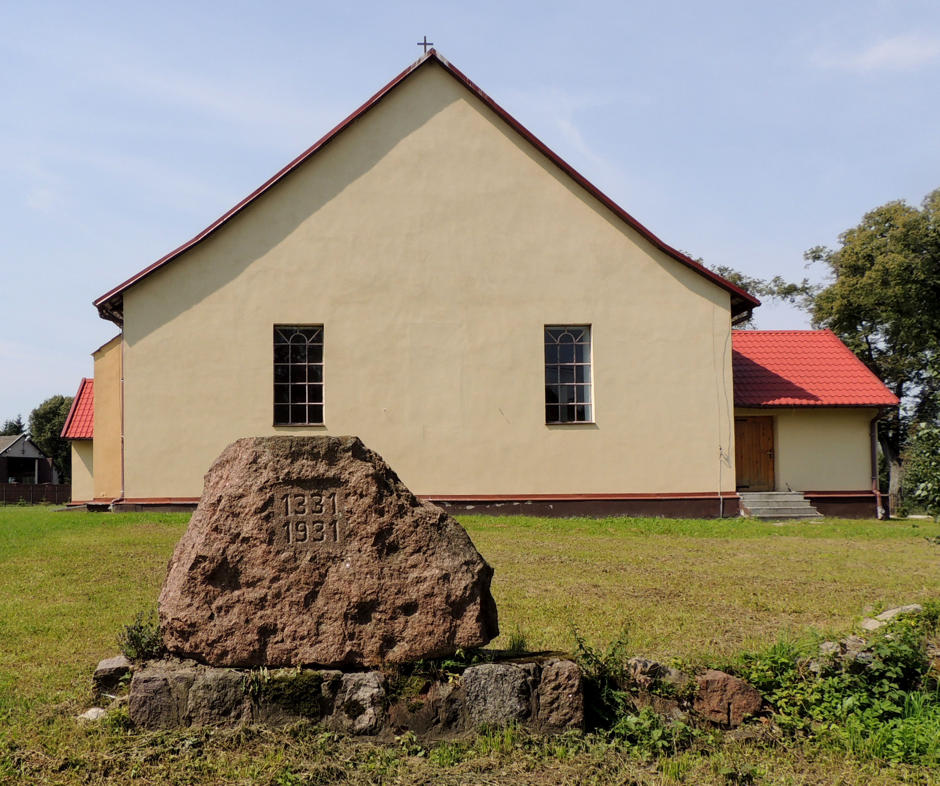 Gronowo, powiat braniewski